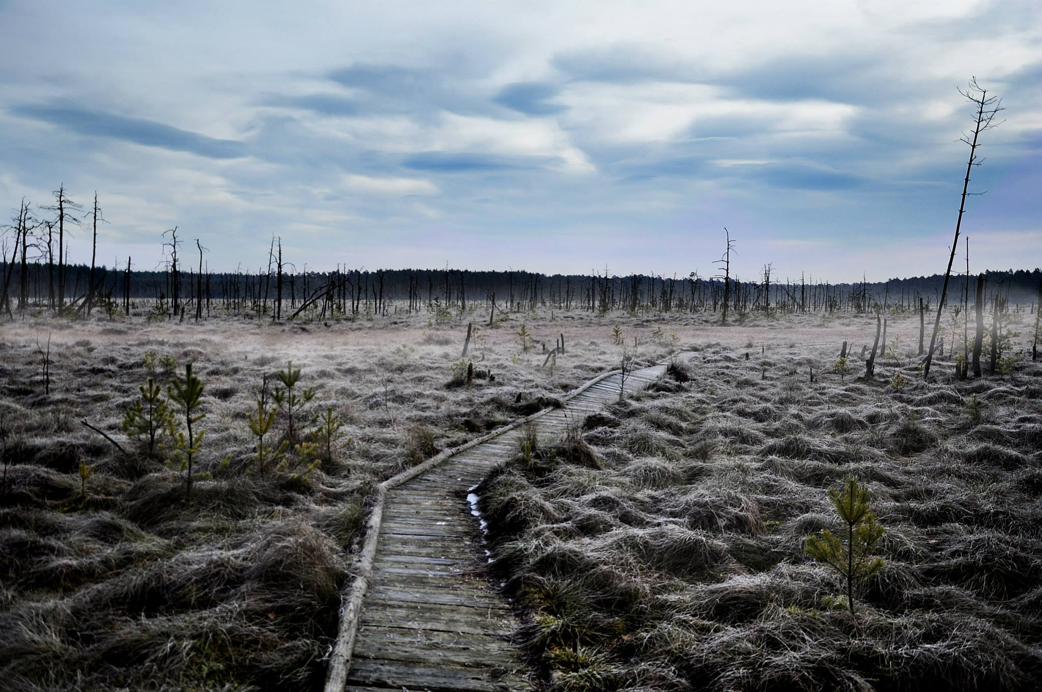 Specjalny obszar ochrony siedlisk Uroczyska Puszczy Solskiej. Rezerwat Obary This is a photography of Natura 2000 protected area with ID PLH060034